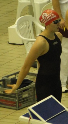 Karolina Szczepaniak Zdjęcie wykonane podczas Grand Prix Polski w pływaniu, Kraków 2012.